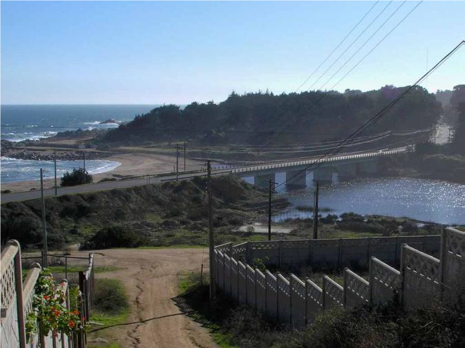 Se observa como esta divida esta zona por la construcción de un puente